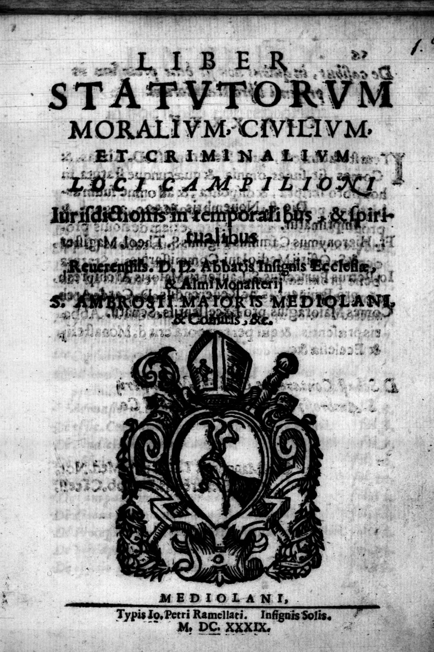 Frontespizio